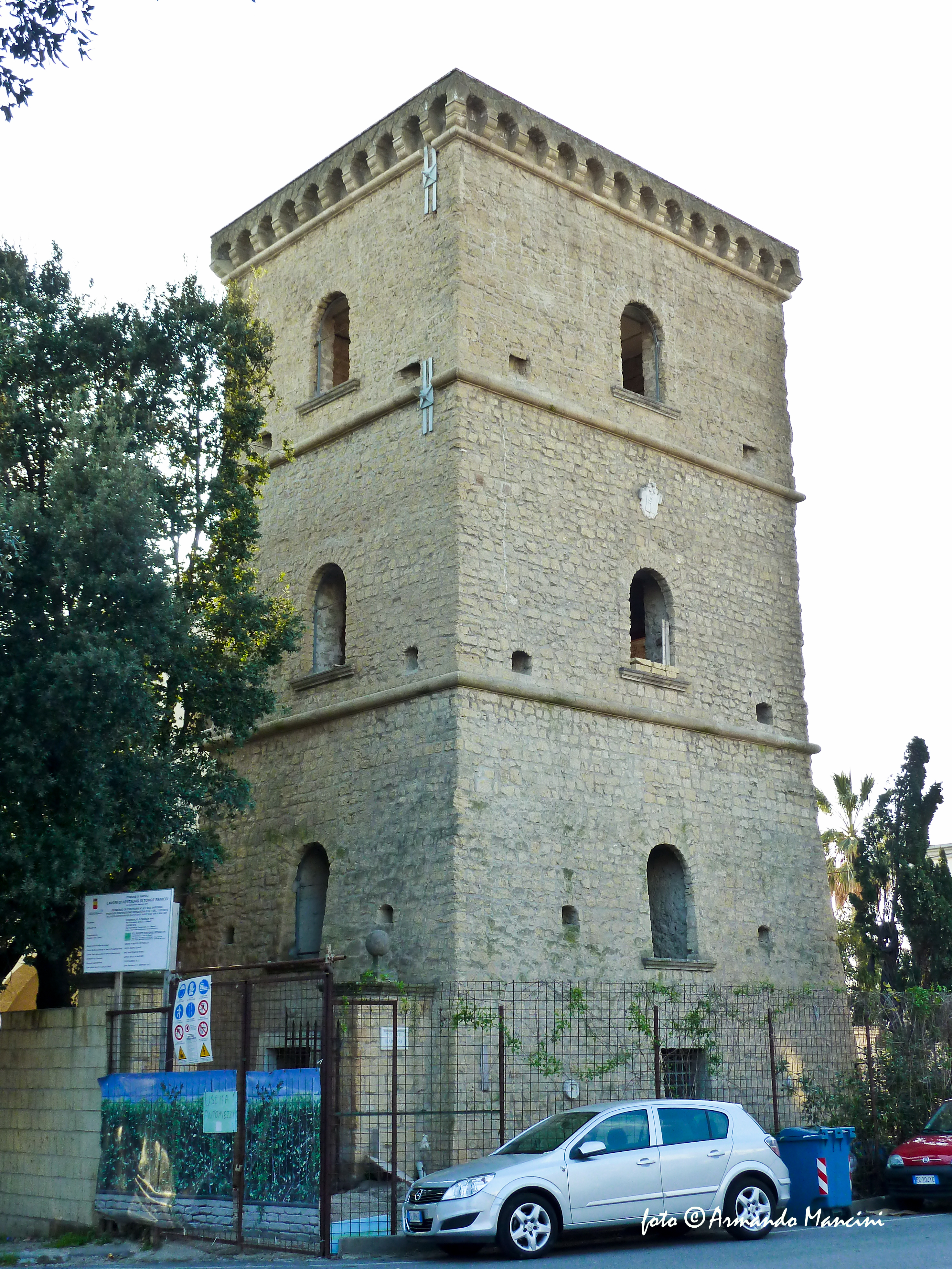 Torre Ranieri - Napoli. Una fortificazione privata medievale situata alla fine di Via Manzoni.